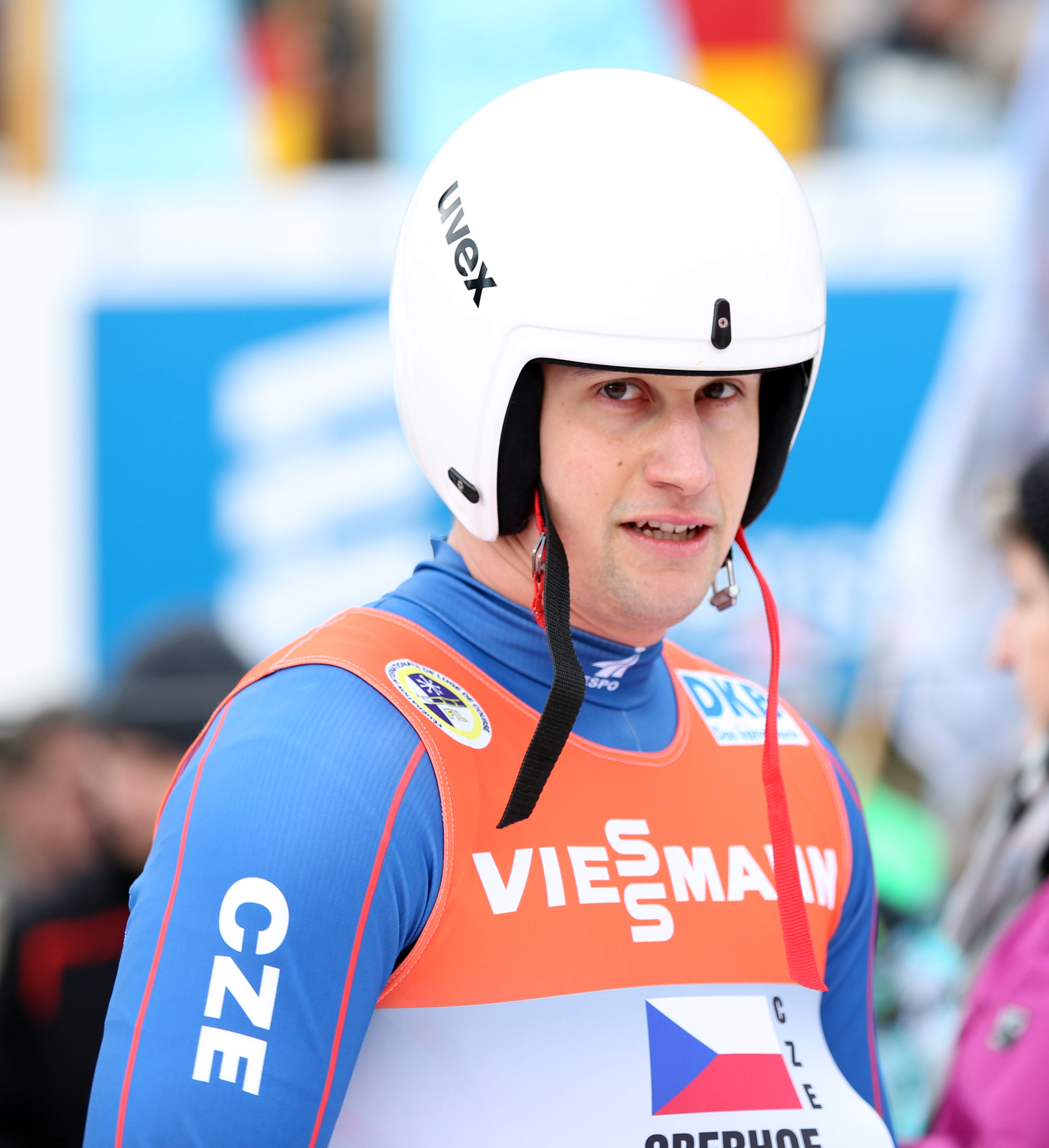 Ondrej Hyman beim Rennrodel-Weltcup 2017 in Oberhof